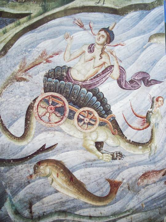 Freske in Gracanica